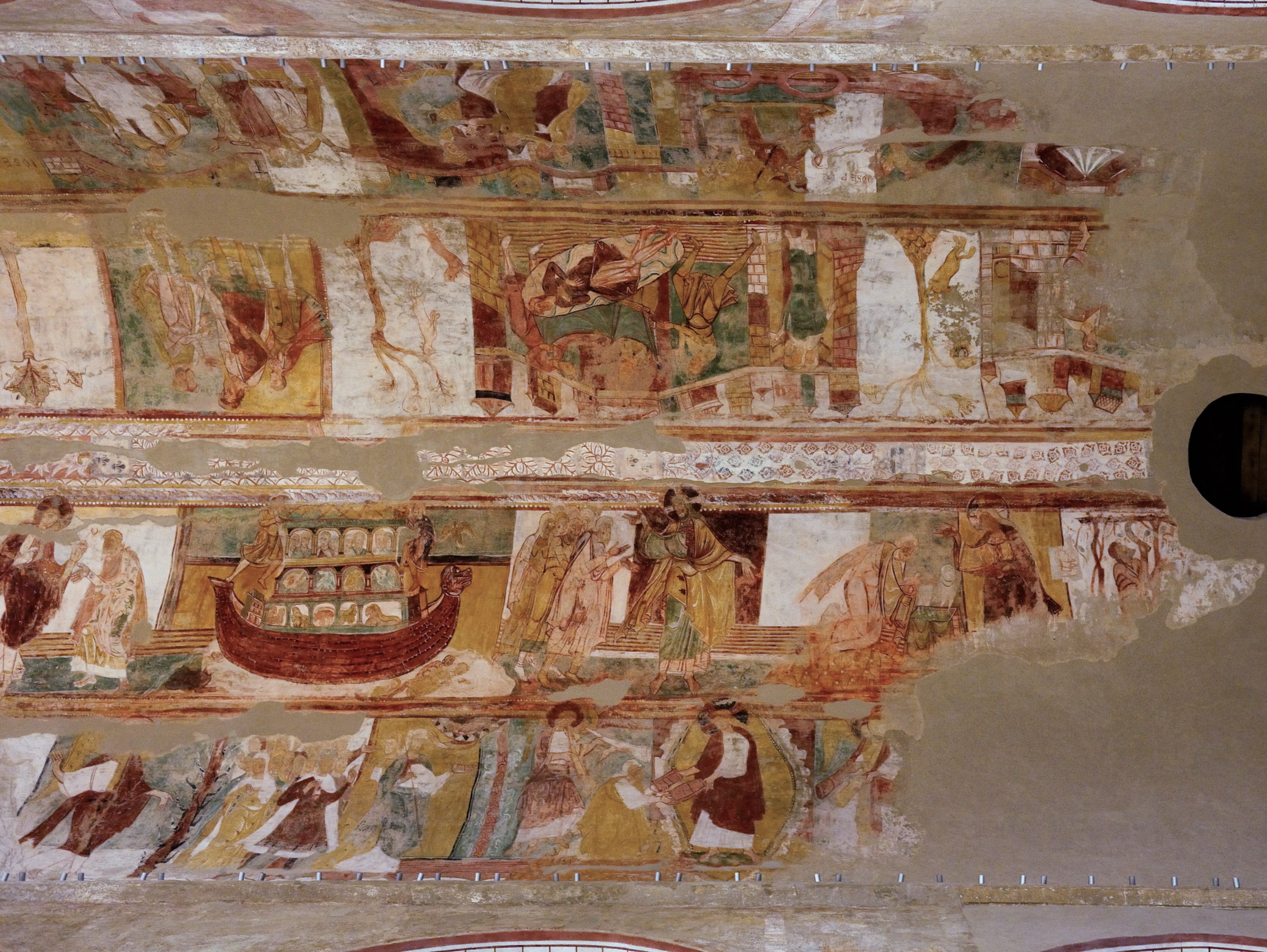 Voir compartimentation